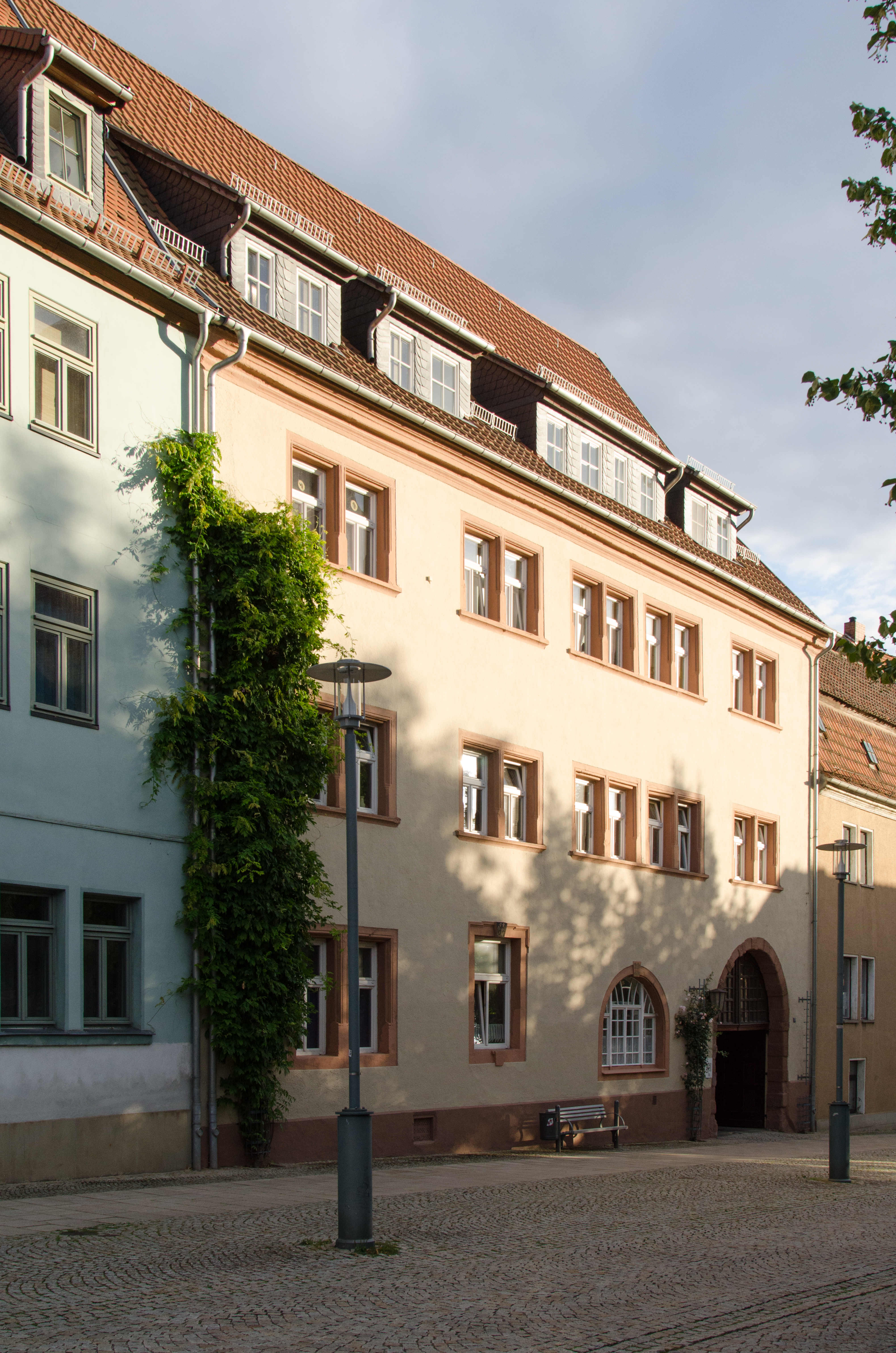 Sangerhausen, Markt 17